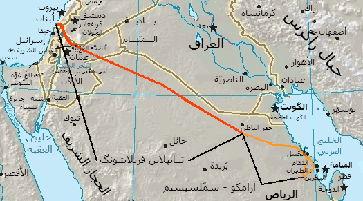 خارطة تُظهر امتداد خُطوط أنابيب النفط والغاز في الشَّام والعراق وشبه الجزيرة العربيَّة.